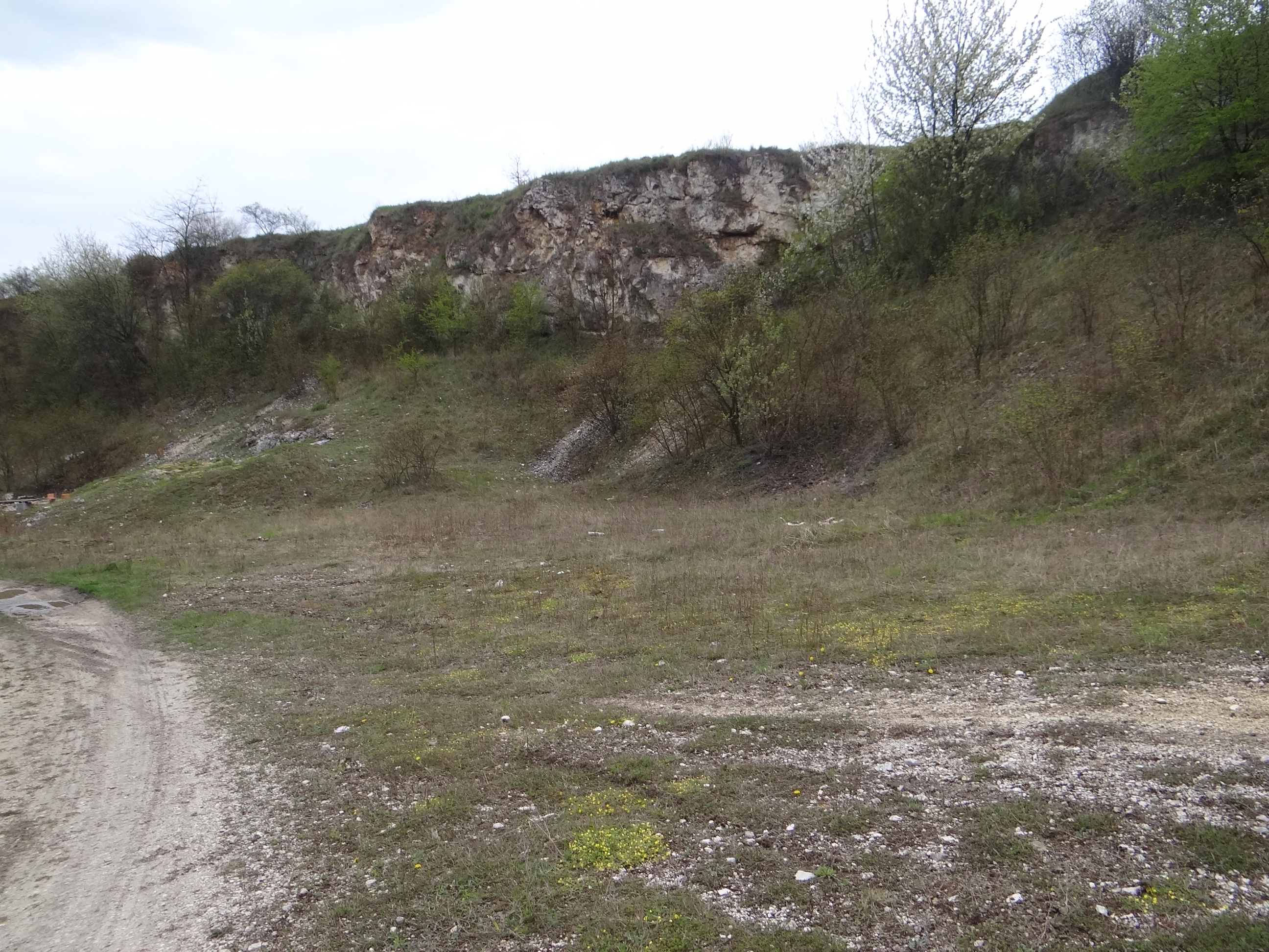 Bogucianka